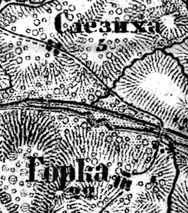 Деревни Горка и Слизиха на карте 1917 года.